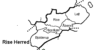 Rise Herred, Aabenraa Amt, Danmark.